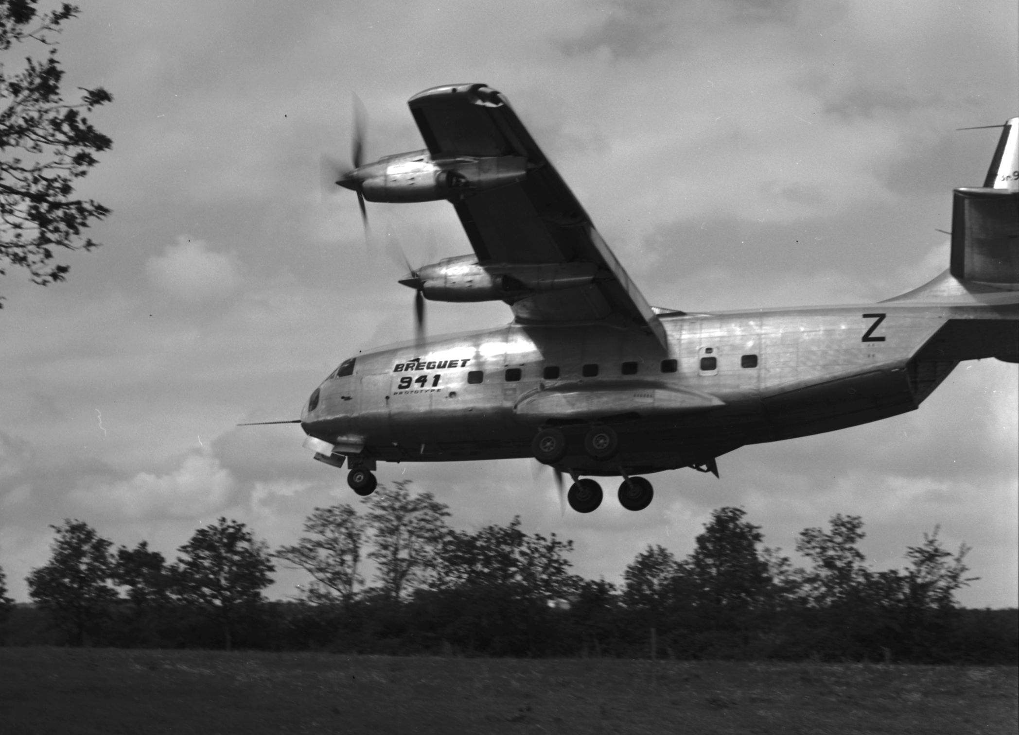 Forêt de Bouconne (Haute-Garonne). 20 Mai 1965. Vue d'un attérissage d'un Bréguet à proximité de la forêt de Bouconne.